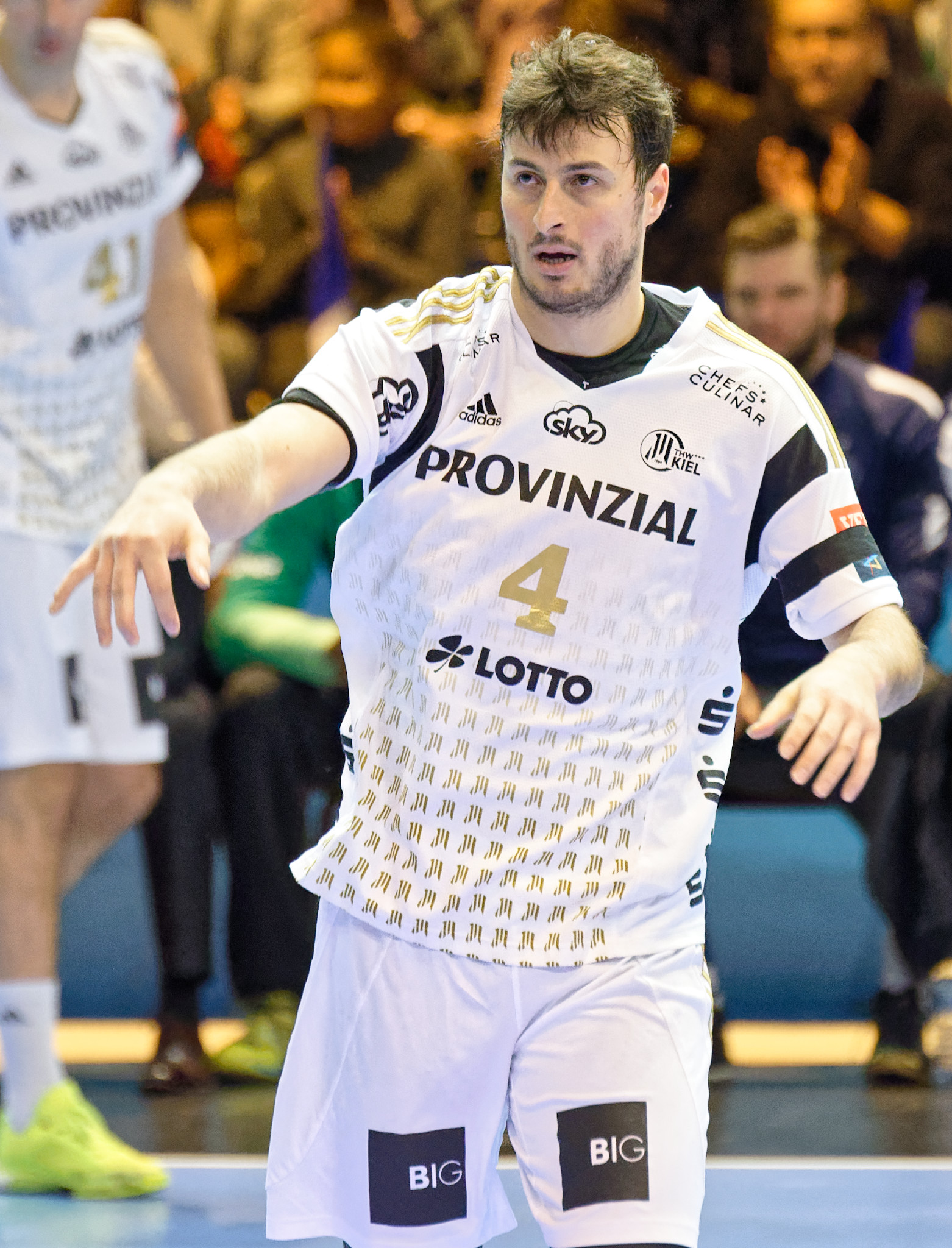 Rencontre de phase de groupe de ligue des champions 2015-16 entre le PSG et le THW Kiel. A la Halle Carpentier (Paris), le 22 novembre 2015.